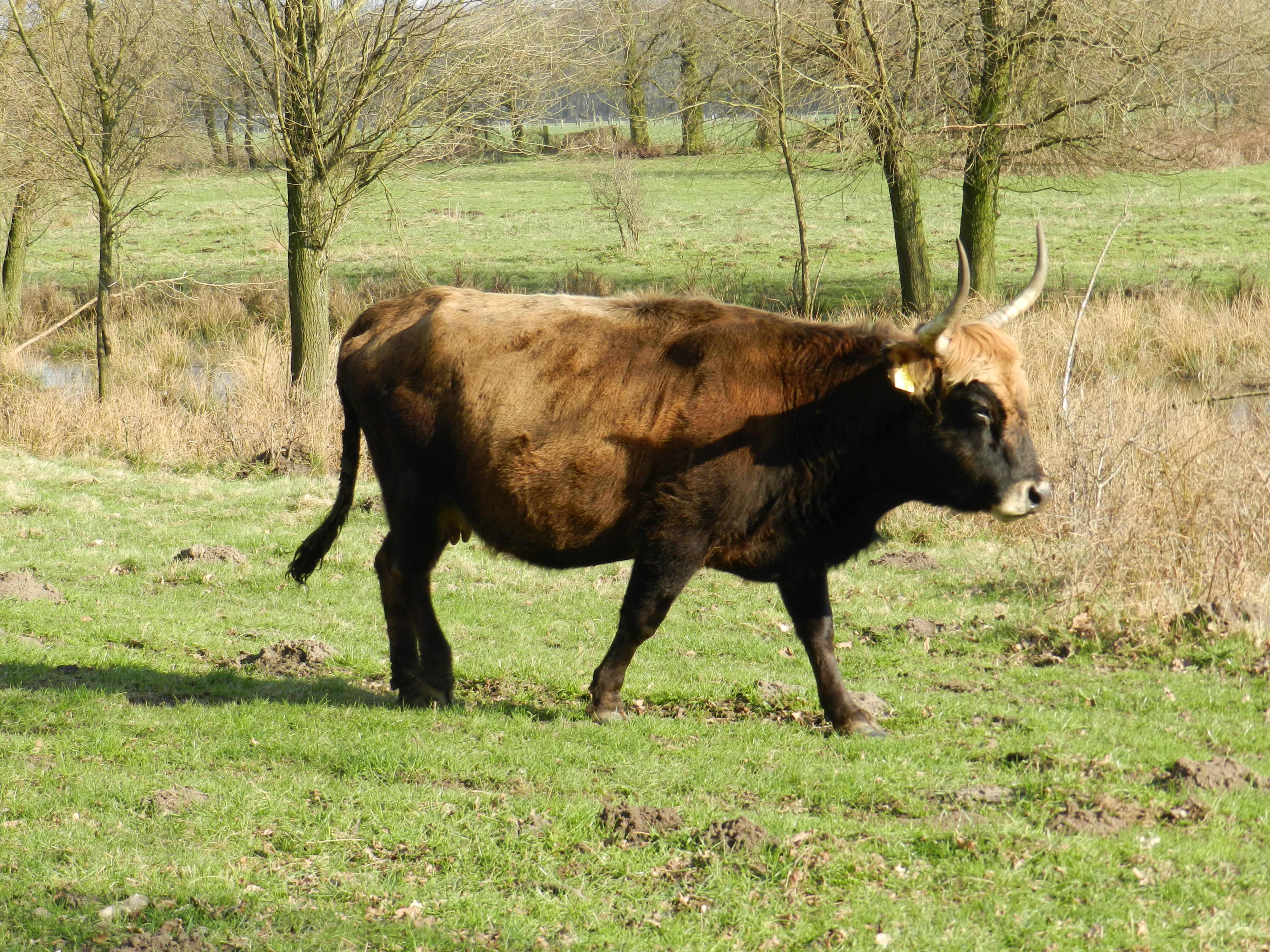 Heckrind-Kuh im Hervester Bruch, Naturschutzgebiet „Bachsystem des Wienbaches“ (NSG RE-049) in Dorsten